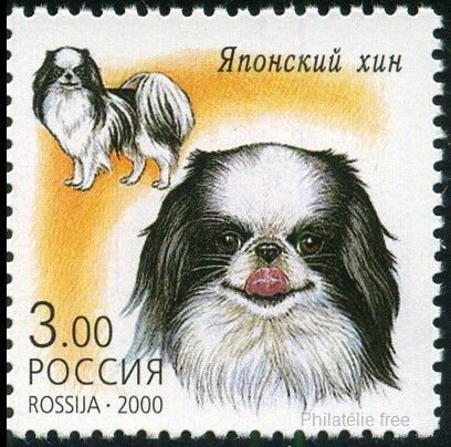 Японский хин